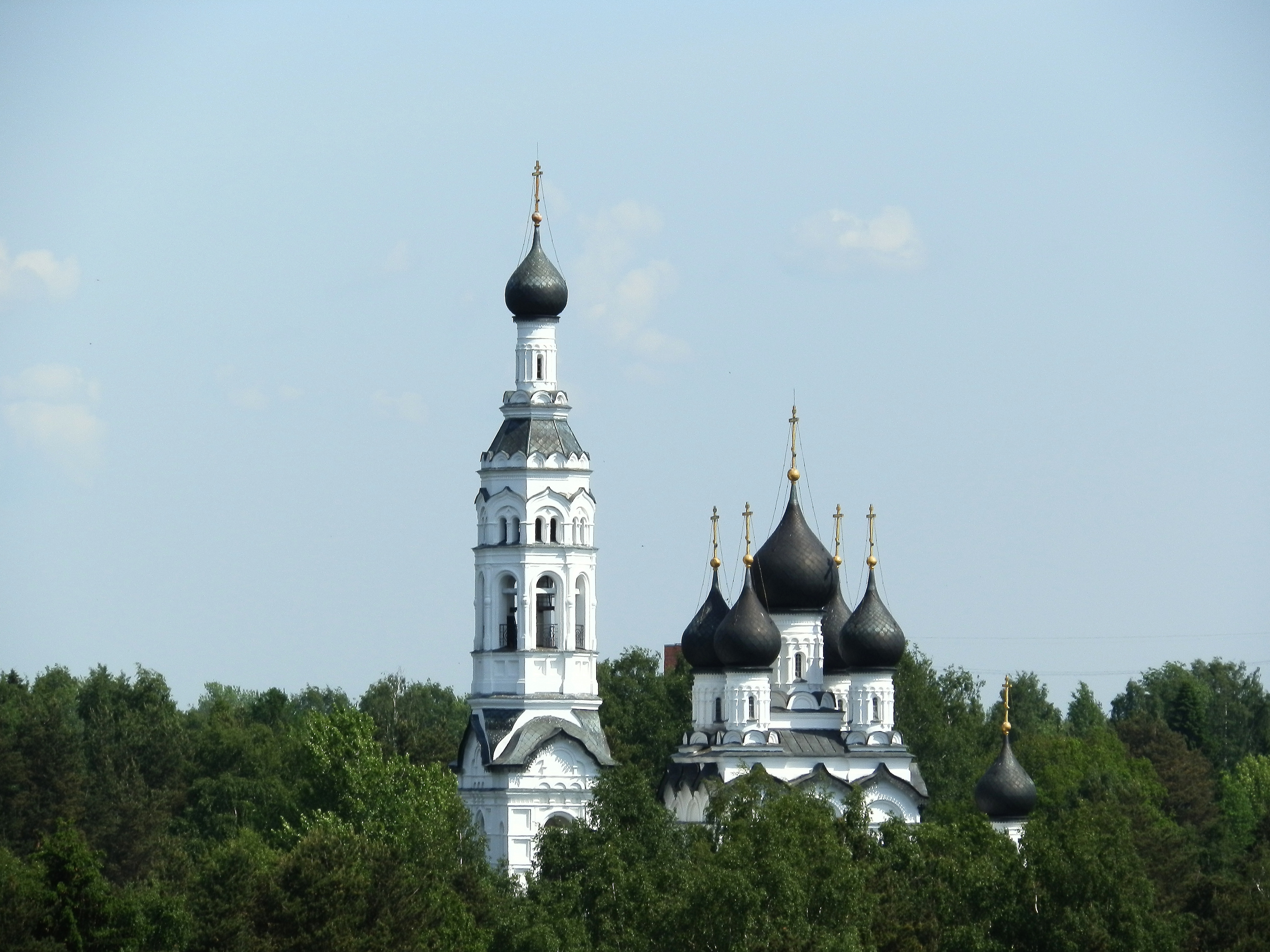 Церковь Казанская (Санкт-Петербург и Лен.область, Зеленогорск, Приморское шоссе, 547)